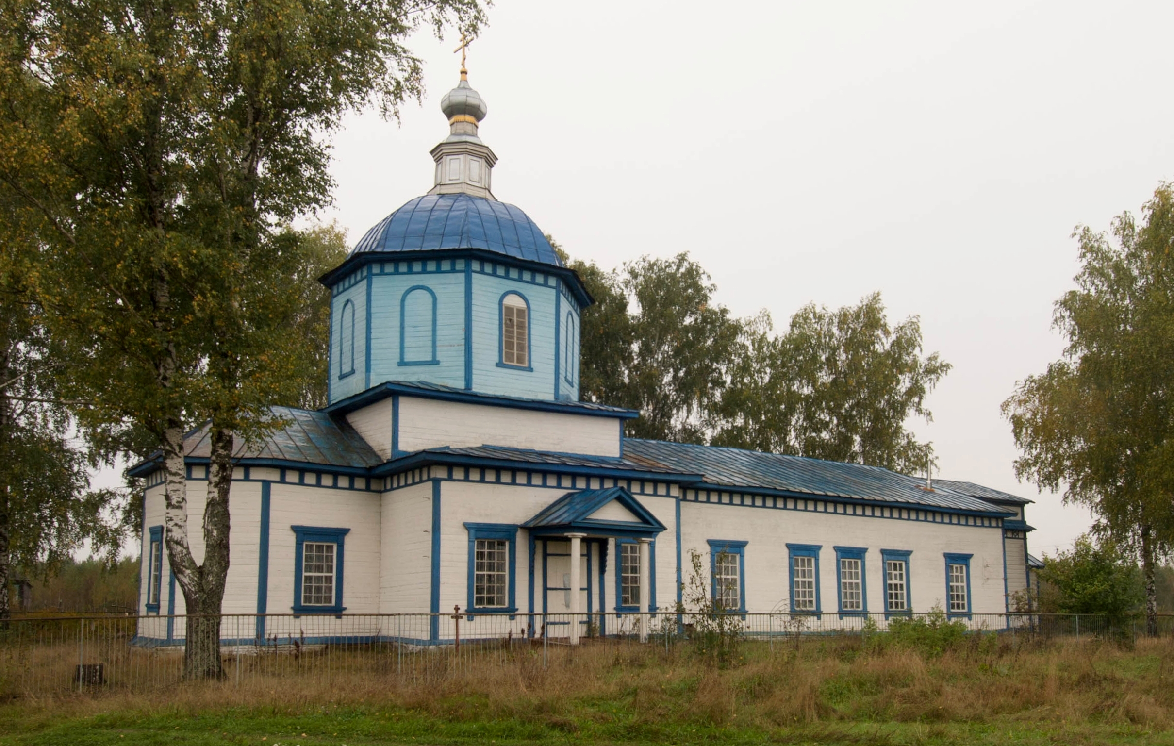 Церковь Введенская с приделом Иоакима и Анны (Рязанская область, Спас-Клепики, село Борисково)